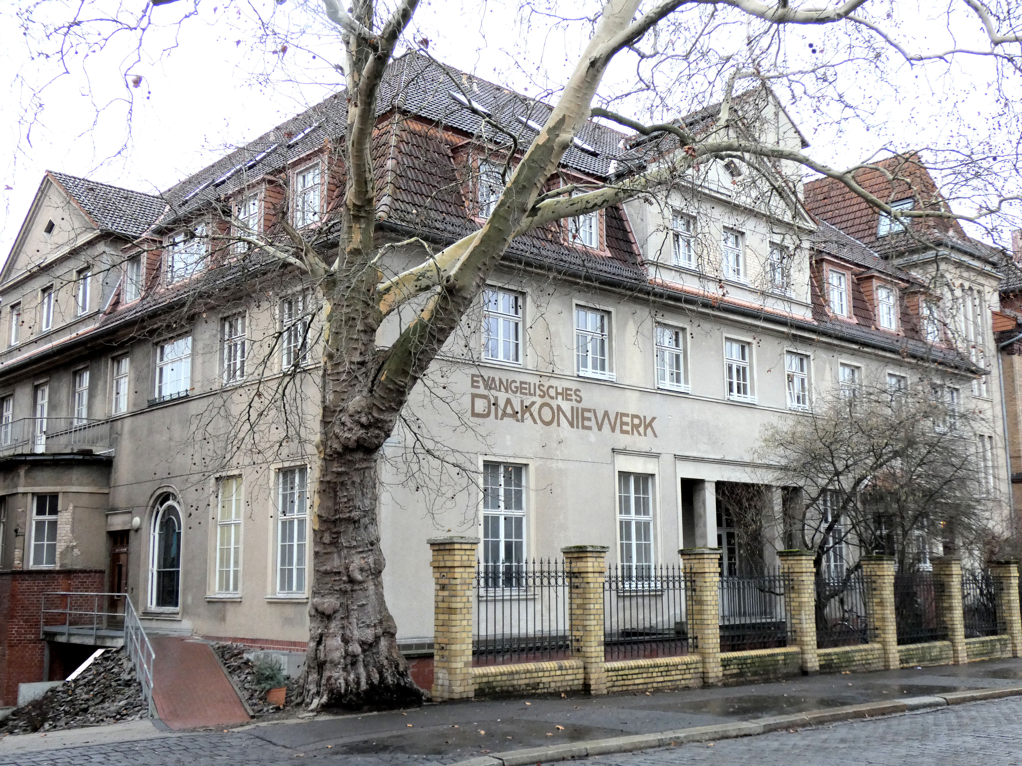 Lafontainestraße 15, Mutterhaus, Anbau von 1929, Diakoniewerk Halle, Halle (Saale)